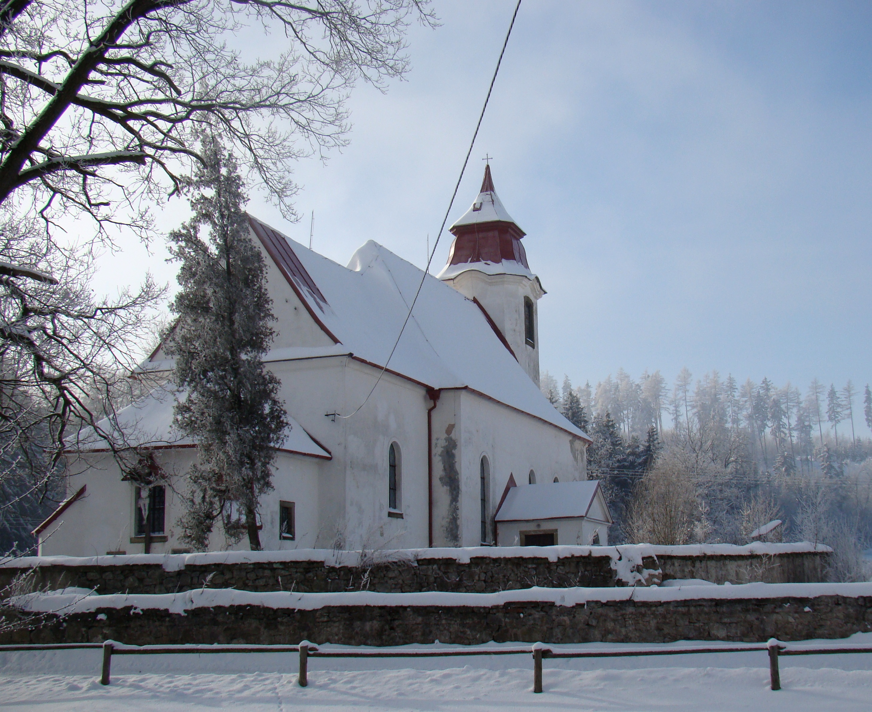 Kochanów - kościół filialny p.w. św. Mateusza, XV/XVII